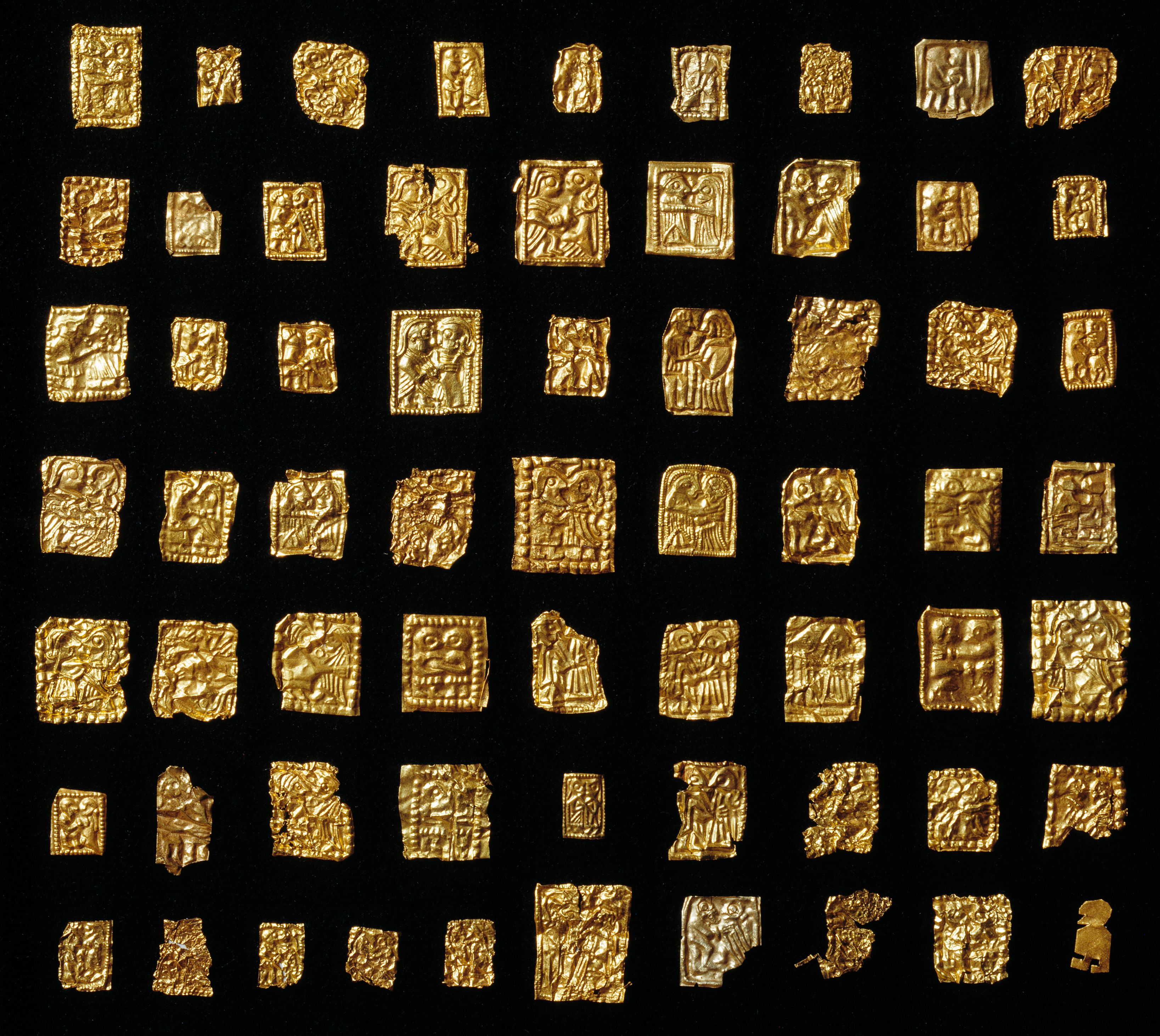 Ca. 60 guldgubber. Bopladsfund, nord for Tange Å. Germansk jernalder. Journ. nr. 625/71